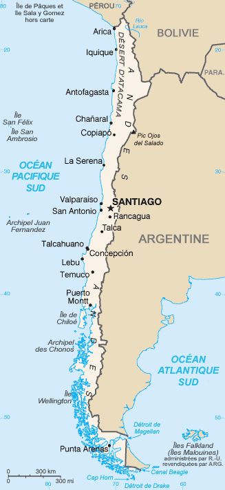 Carte du Chili Source : CIA World Factbook fr: site (traduite et complétée)